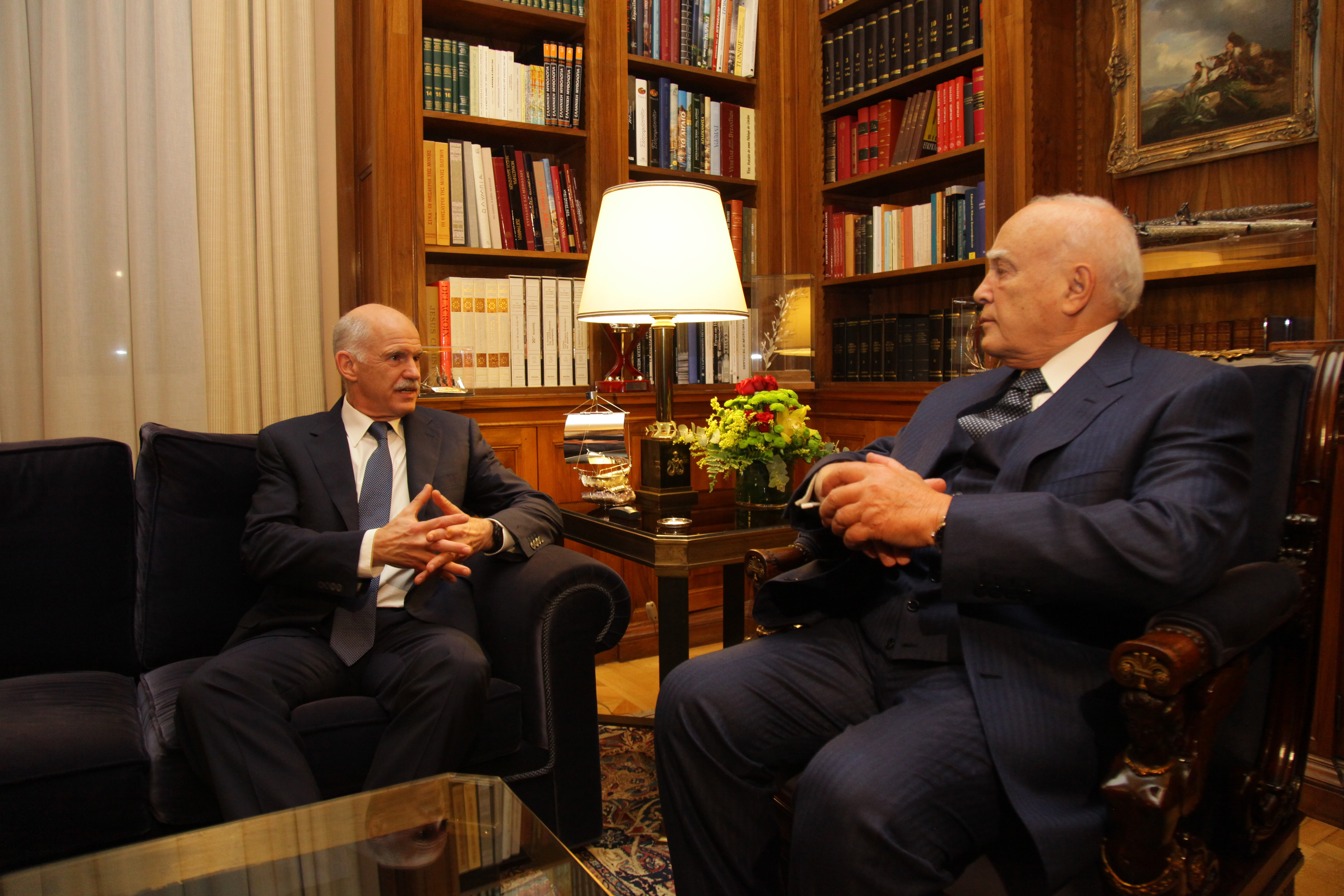 Συνάντηση με τον Πρόεδρο της Δημοκρατίας, Κάρολο Παπούλια Προεδρικό Μέγαρο 9 Νοεμβρίου, 2011